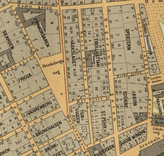 Del av Stockholmskarta visande Norra Smedjegatan, Regeringsgatan, Brunkebergstorg m.fl.